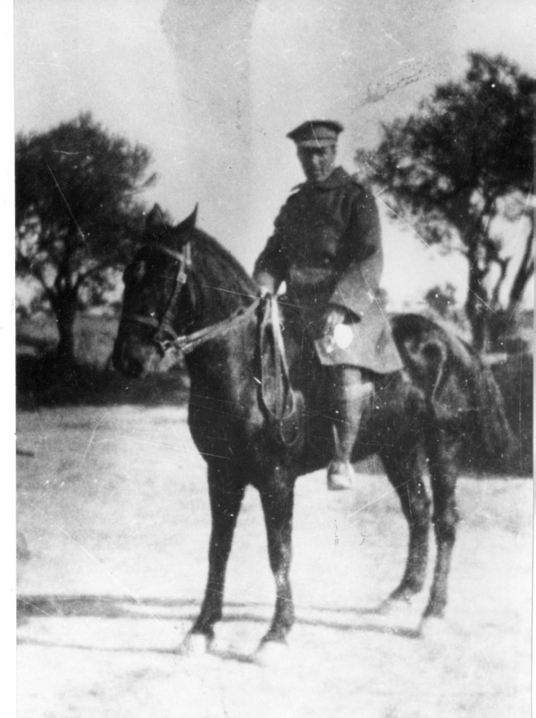 "יוסף טרומפלדור במדי קצין גדוד נהגי הפרדות רכוב על סוס, גליפולי"